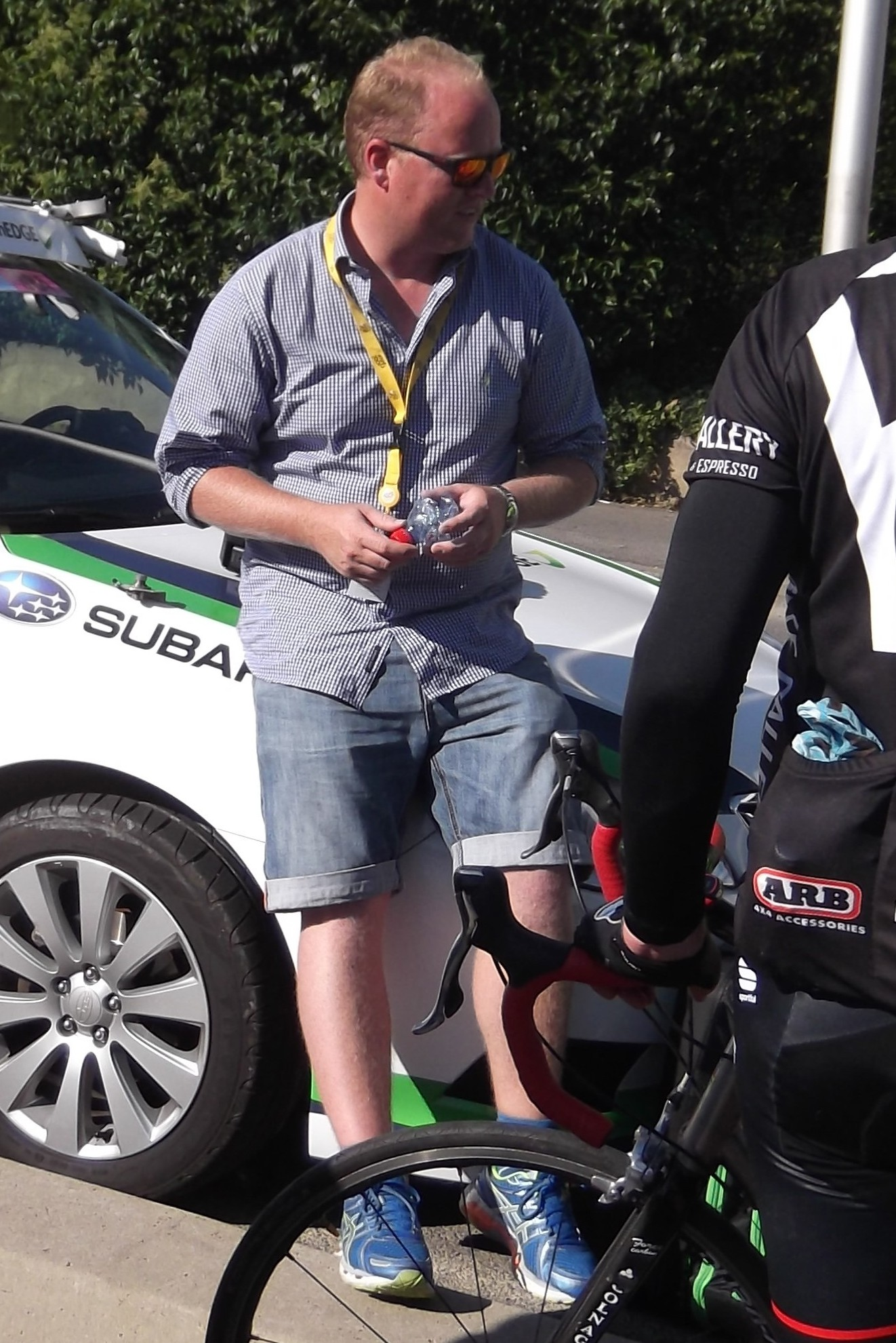 Shayne Bannan, manager du team "Orica Green Edge", à l'arrivée du Tour à Montpellier.